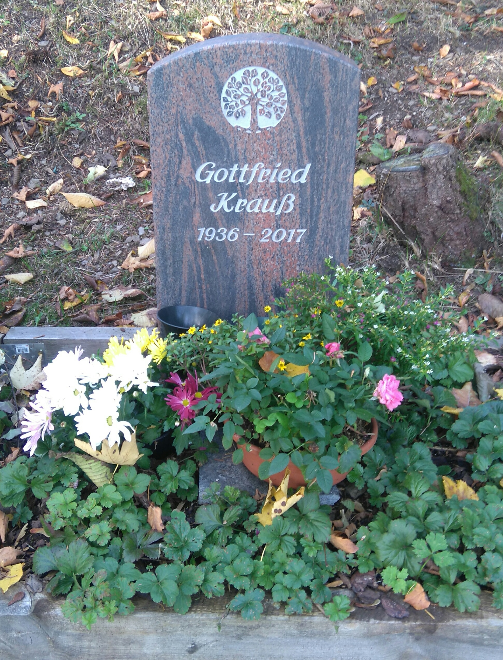 Grab von Gottfried Krauß